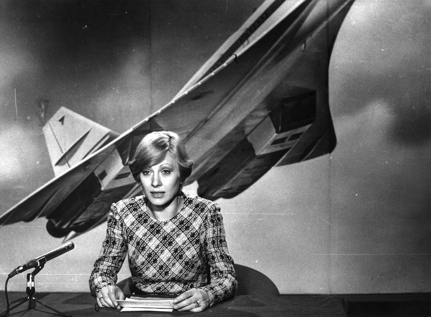 Az MTV Delta című műsorának stúdiójában Kudlik Júlia műsorvezető.